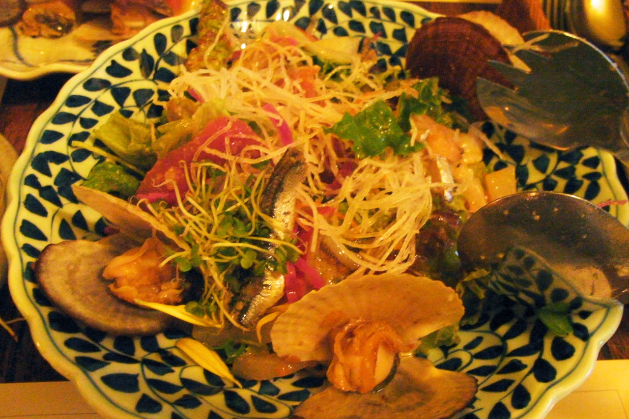 立石のプリンとイタリアンのお店、Marloweの料理。 サラダ。周りにいわしの焼いたのやホタテの稚貝も付いている。アジとかイカとかも入っている。ここでいつも出てくるものだが、その日の仕入れによって違ってくる。